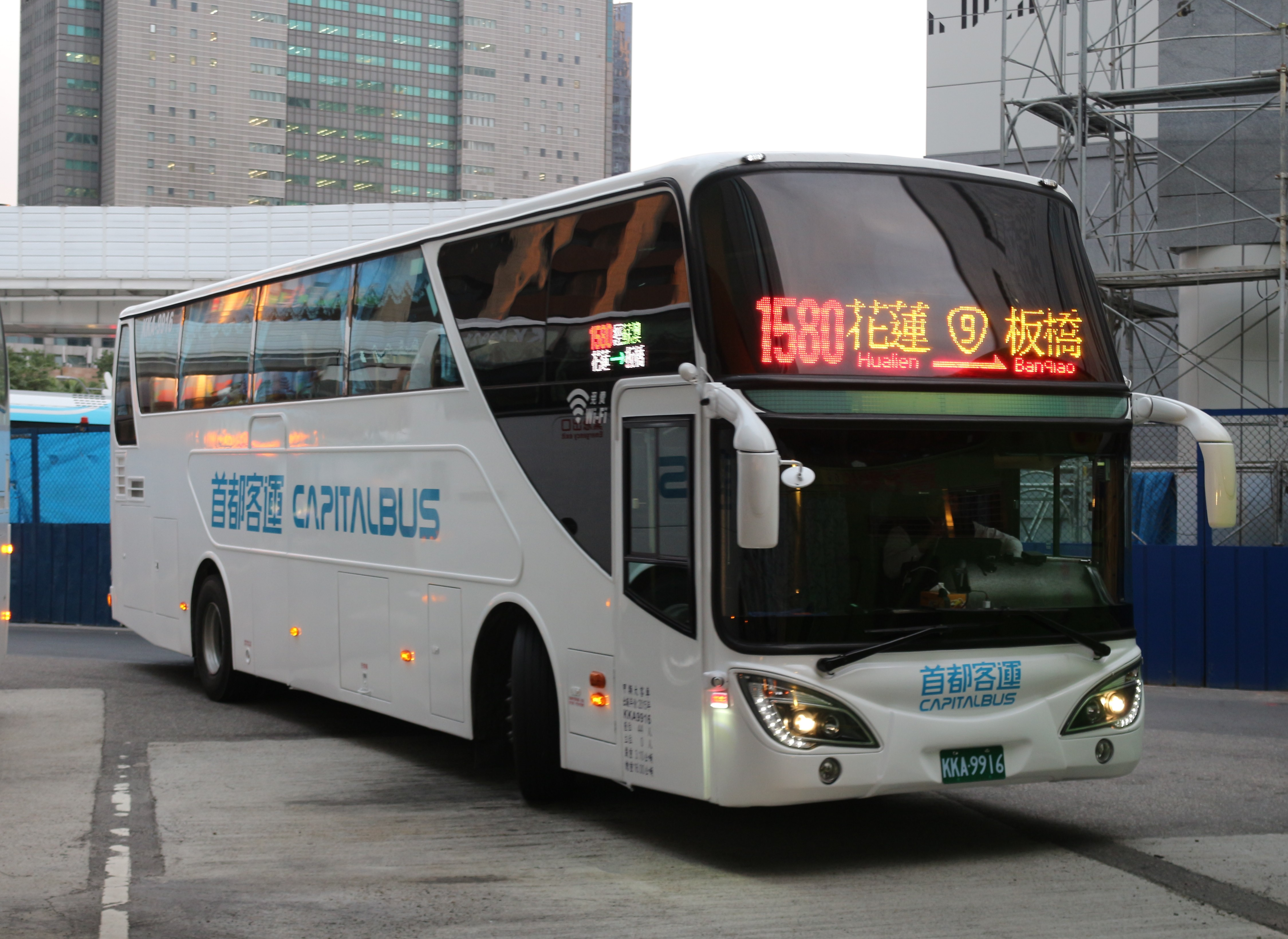 2015 HINO RN8JSVU-SSF KKA-9916 1580